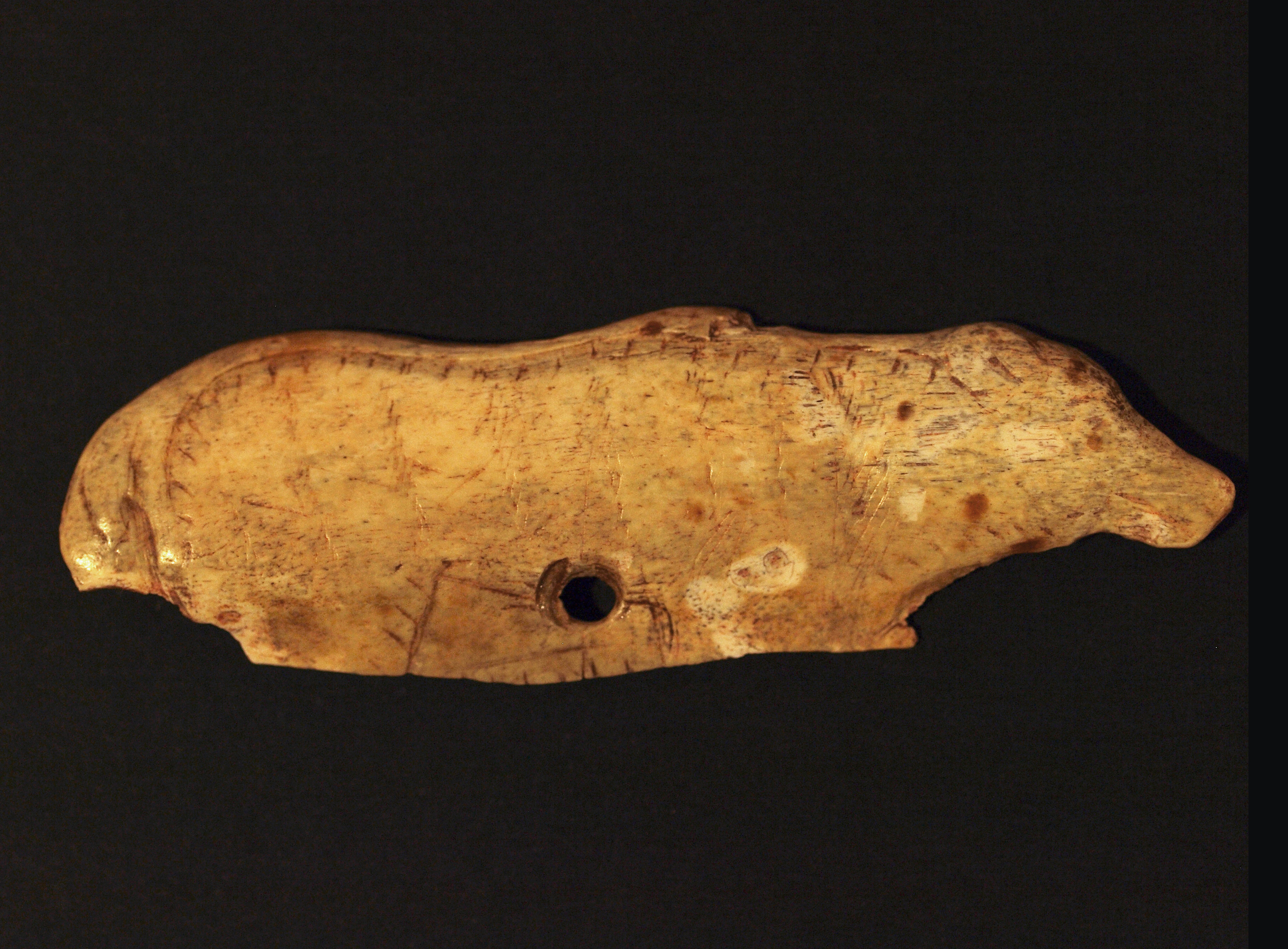 La pieza proviene de la zona IV de la Galería Inferior de La Garma (Omoño) y tiene una antigüedad aproximada de 16.000 años, correspondiente al periodo Magdaleniense Medio. En una costilla, probablemente de ciervo, seccionada de forma longitudinal, se recortó la figura de un oso de perfil en la que se grabaron, además, numerosos detalles: ojo, oreja, boca y pelaje. Este objeto también se perforó, con el fin de llevarlo colgado o prendido a la ropa.